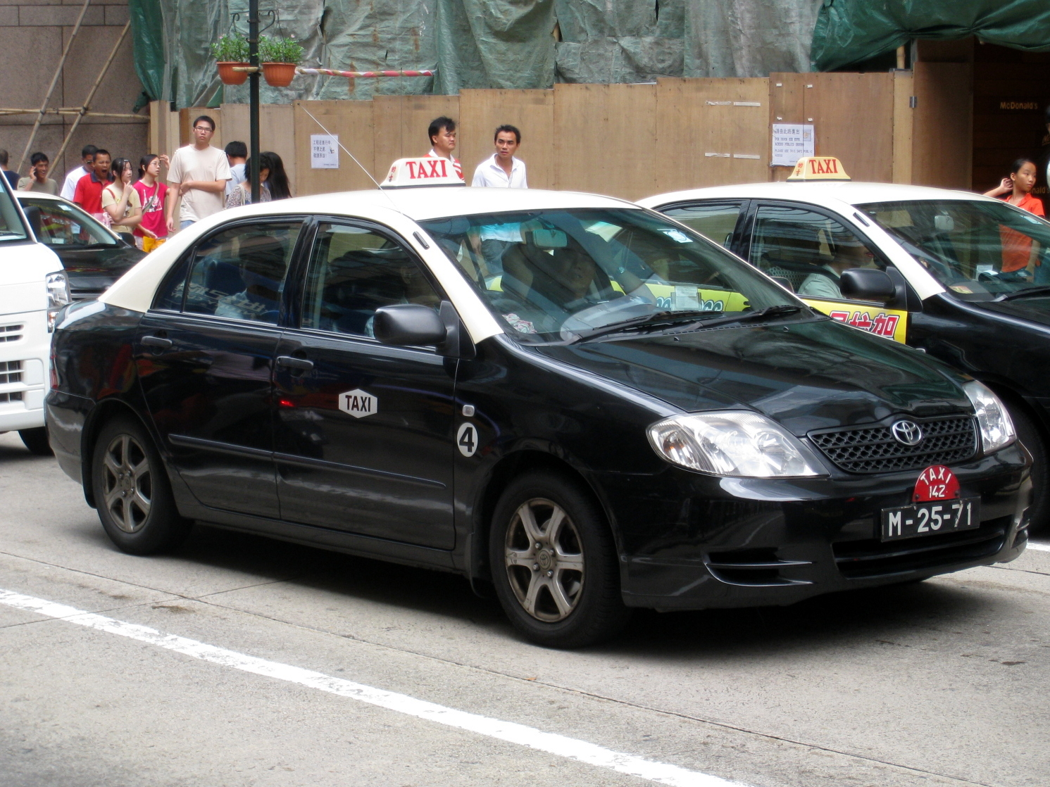 Macau Toyota Corolla Taxi 澳門的士